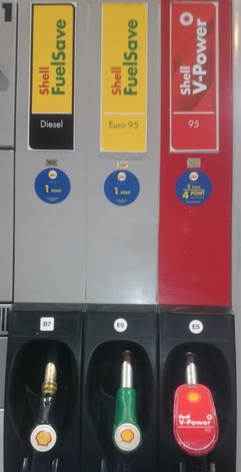 A kép közterületen készült egy közeli shell benzinkút egyik tankolóállásáról, ahol, már láthatók az új üzemanyagcímkék. A kép saját készítésű.